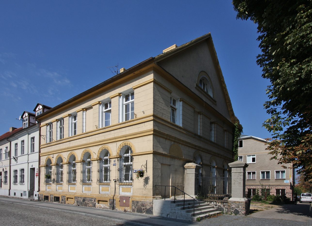 Międzyrzecz, Rynek 12, dom, mur., pocz. XIX.